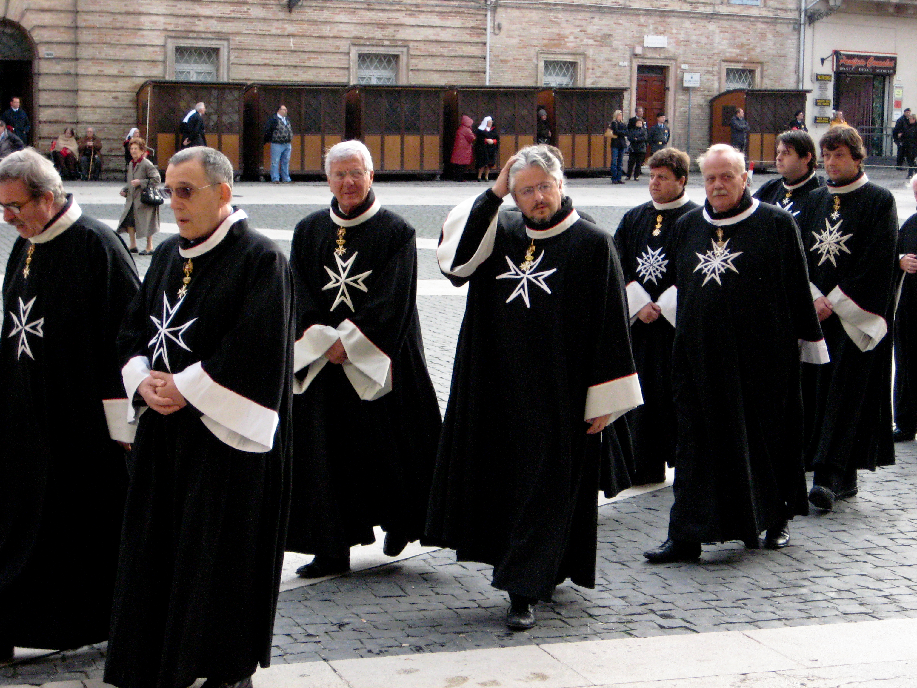 Pilgrimage to Loreto, Marche in 2009